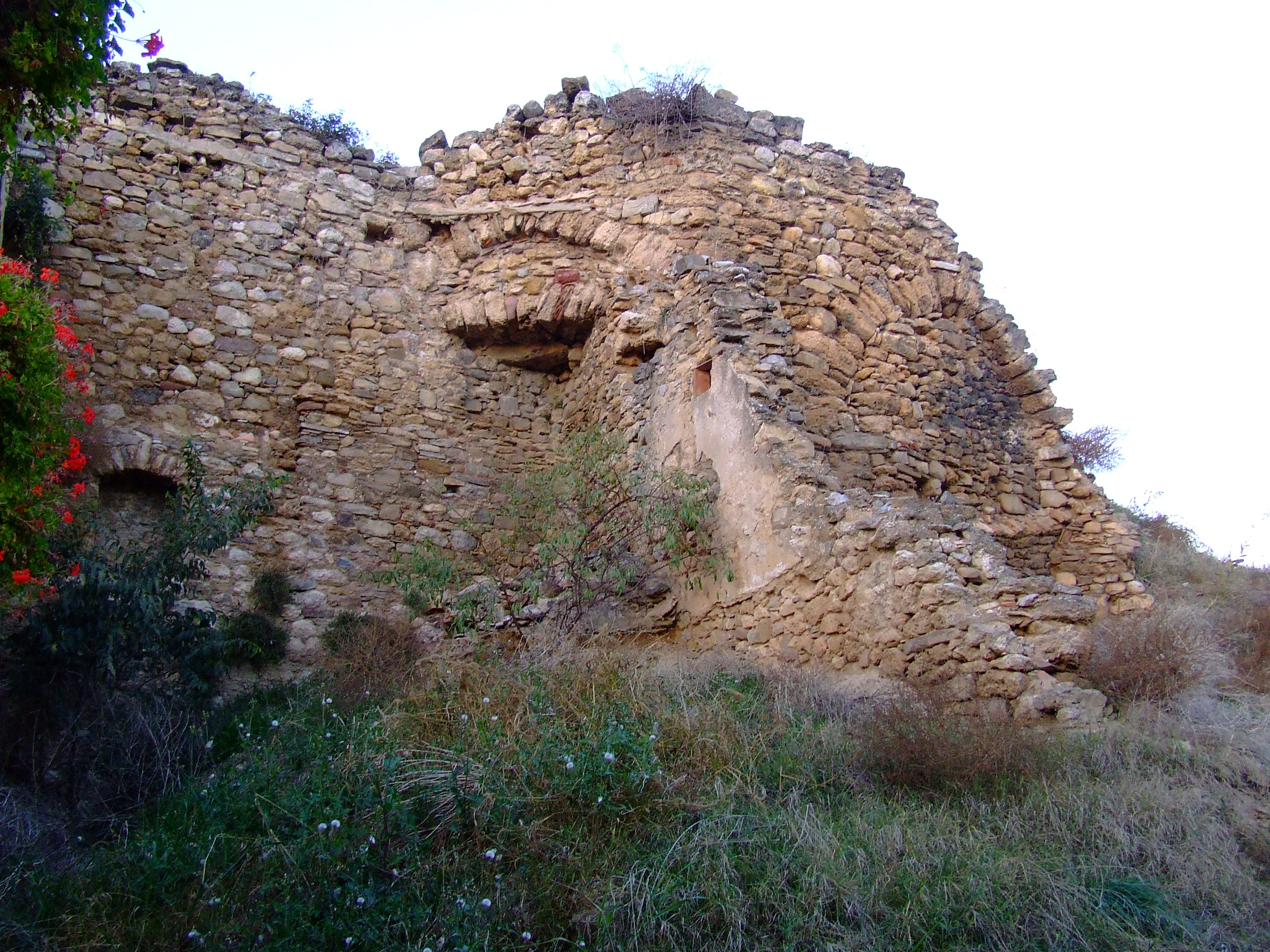 Castell de Sant Romà d'Abella (Isona i Conca Dellà, Pallars Jussà)